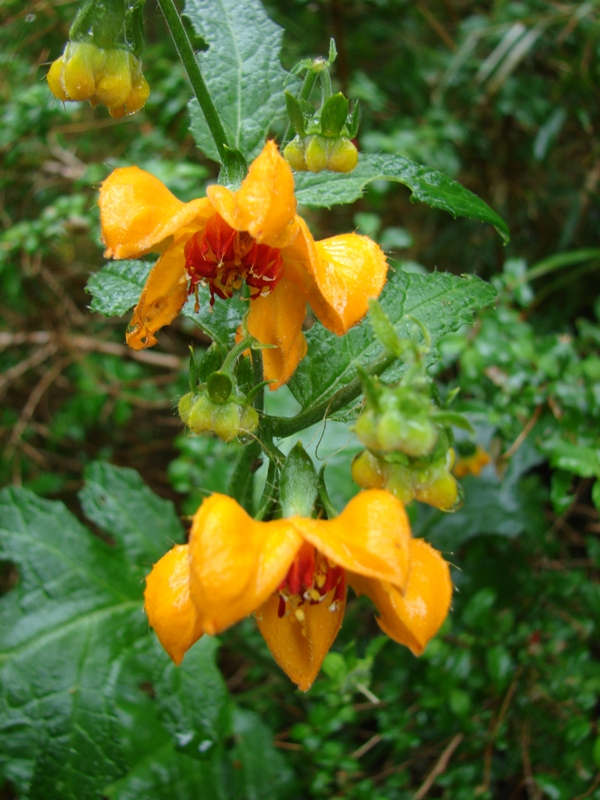 Loasa acanthifolia. Parque Nacional Huerquehue, bajo bosque. Plantas conspicuas del triángulo Pucón-Volcán Lanín-Parque Nacional Huerquehue